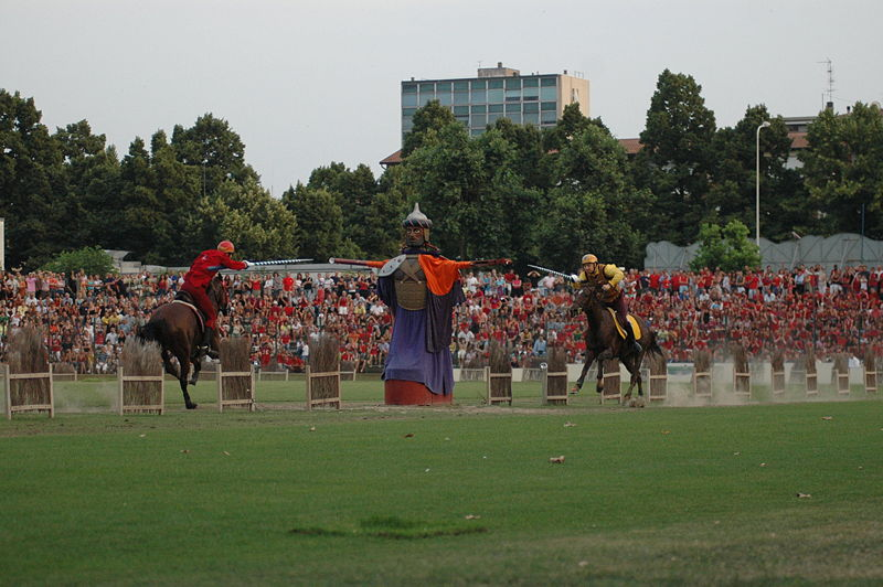 Palio del Niballo Faenza Italie